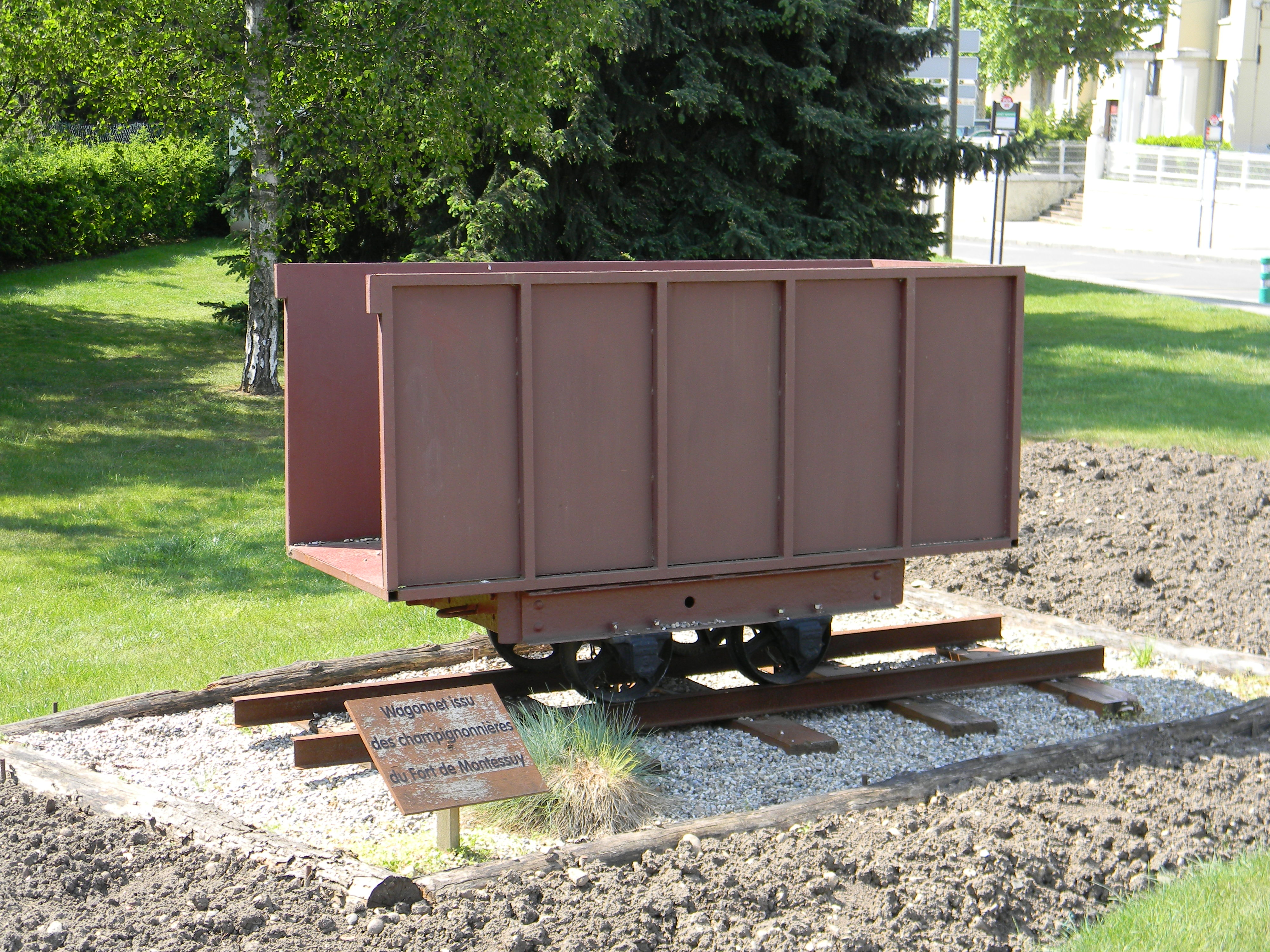 Wagonnet issu des champignonnières du Fort de Montessuy à Caluire-et-Cuire